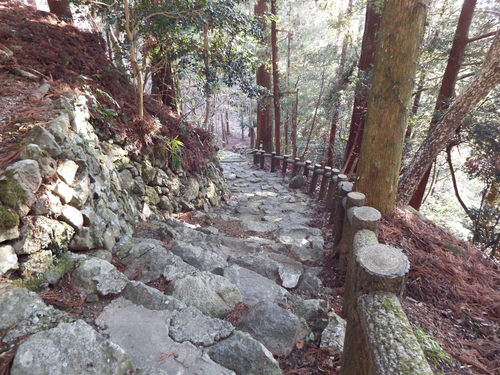 阿波遍路道 太龍寺道（前半）